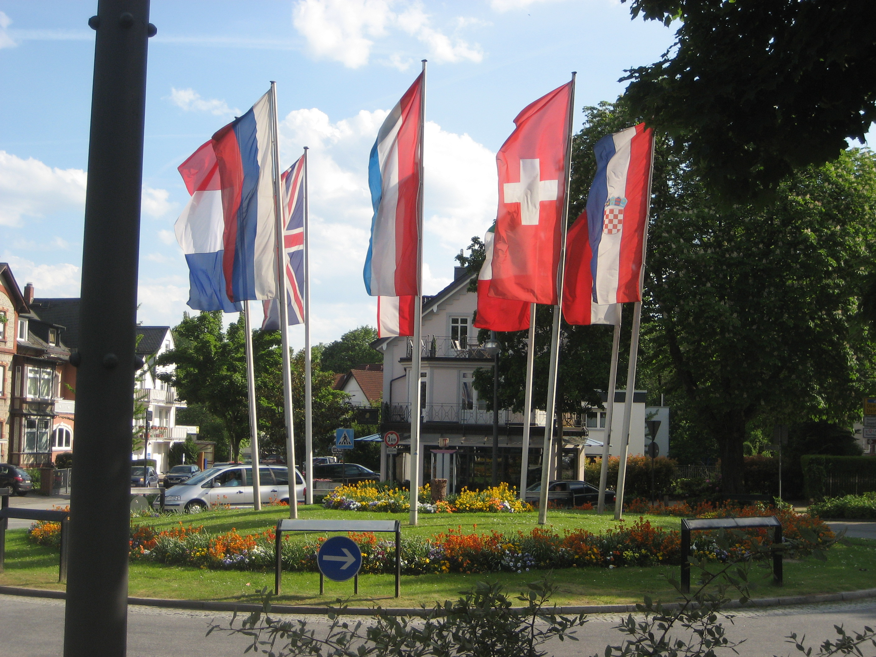 Bad Homburg, Europakreisel